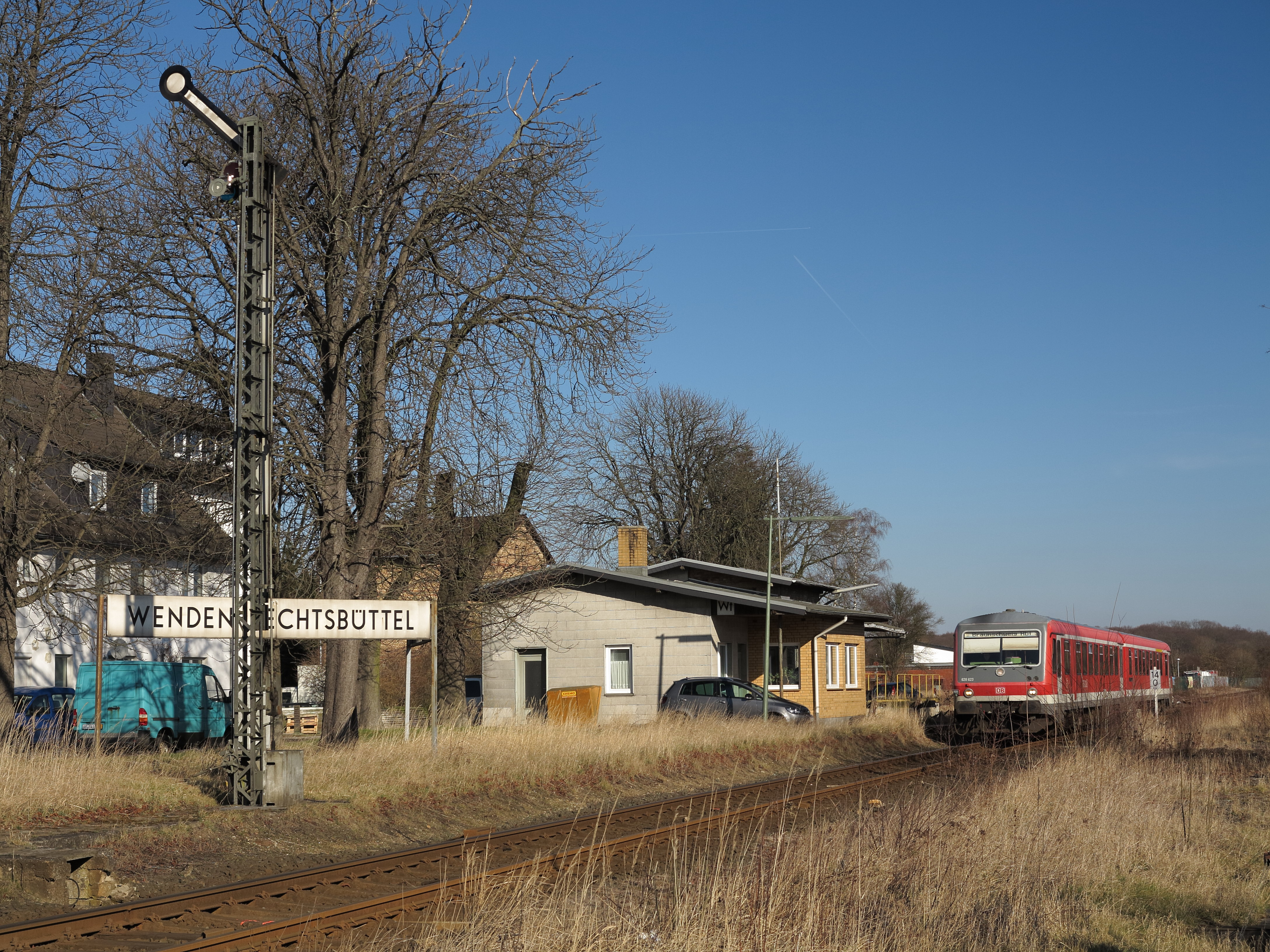 Der Bahnhof Wenden-Bechtsbüttel. Seit 1988 halten hier keine Reisezüge mehr.